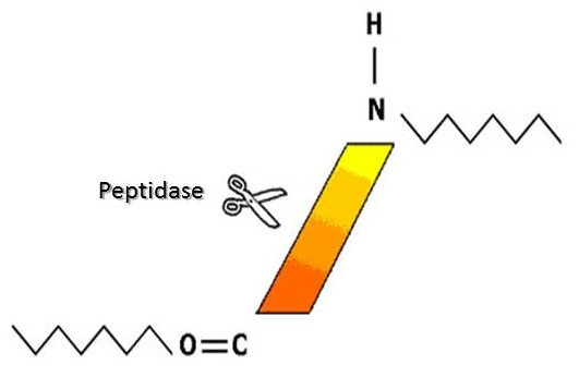 clivagem proteolitica